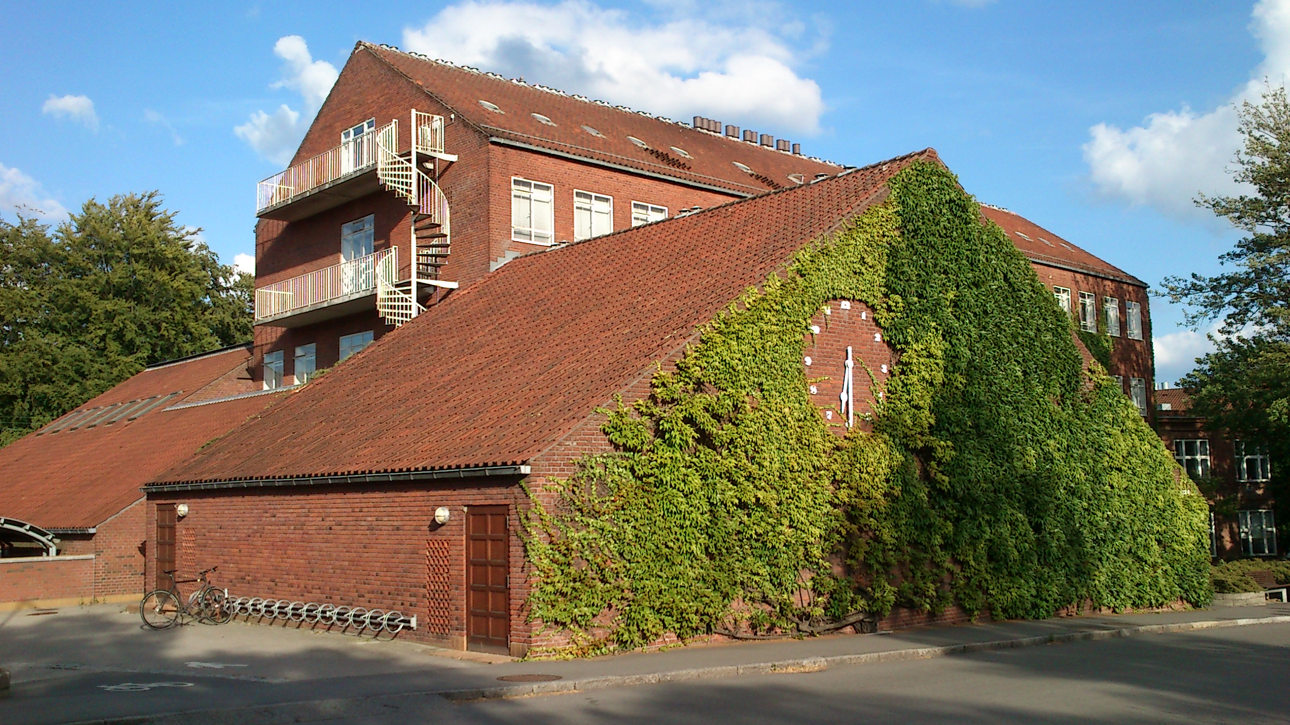 Uret ved Århus Kommunehospital.